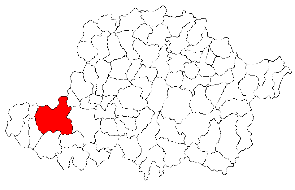 Categorie:Hărţi ale judeţului Arad